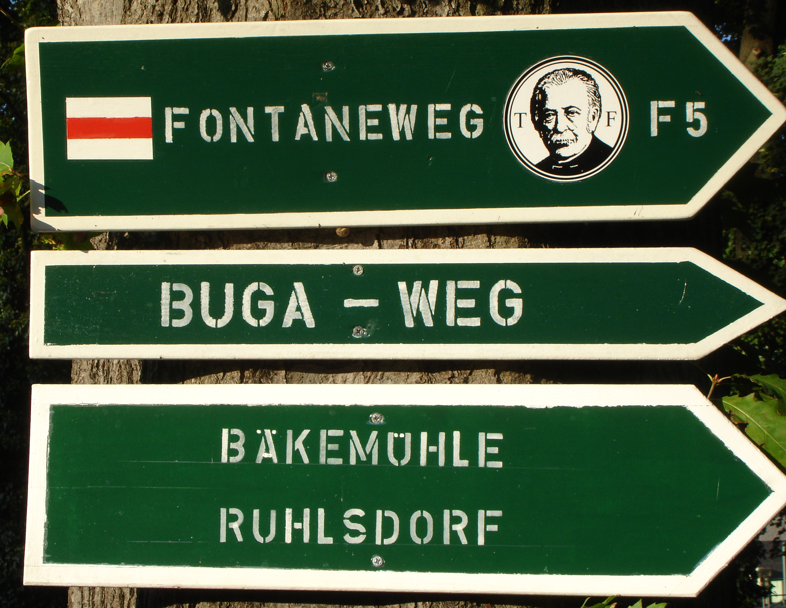 Kleinmachnow Markierung Fontane- und Buga-Wanderweg; direction sign Fontane and Buga trail